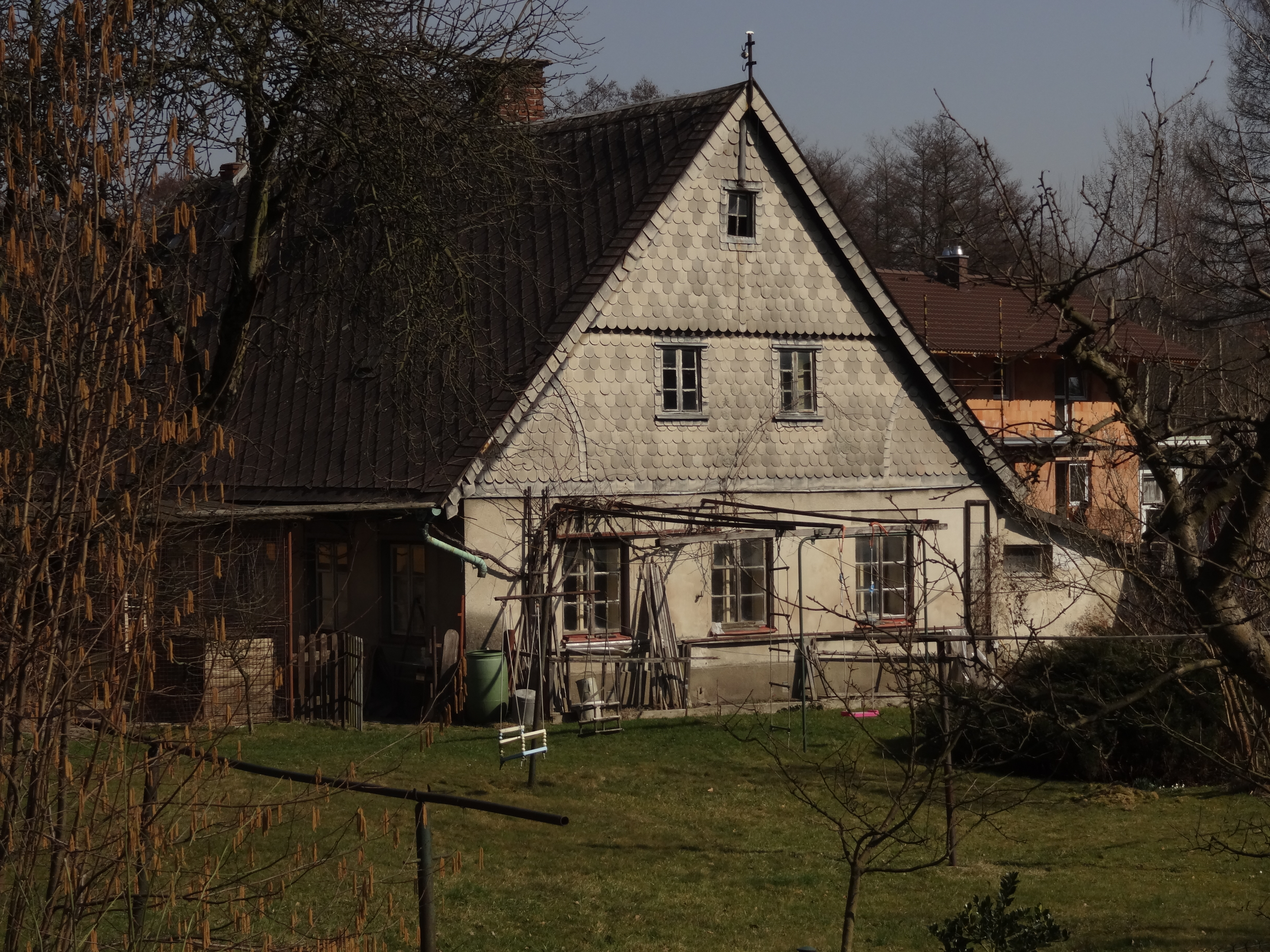 Doubí (Liberec) - Hodkovická 20